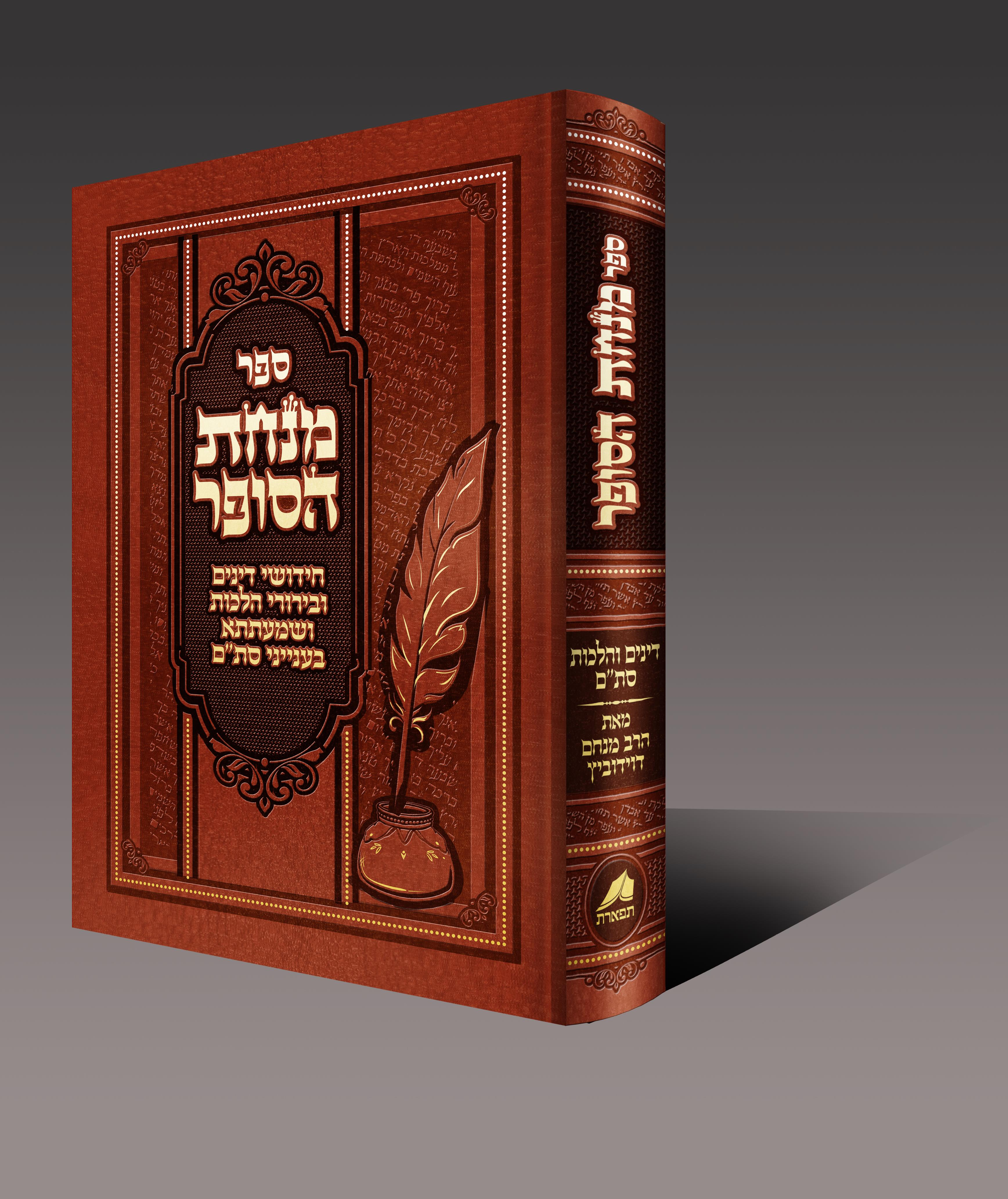 ספר מנחת הסופר